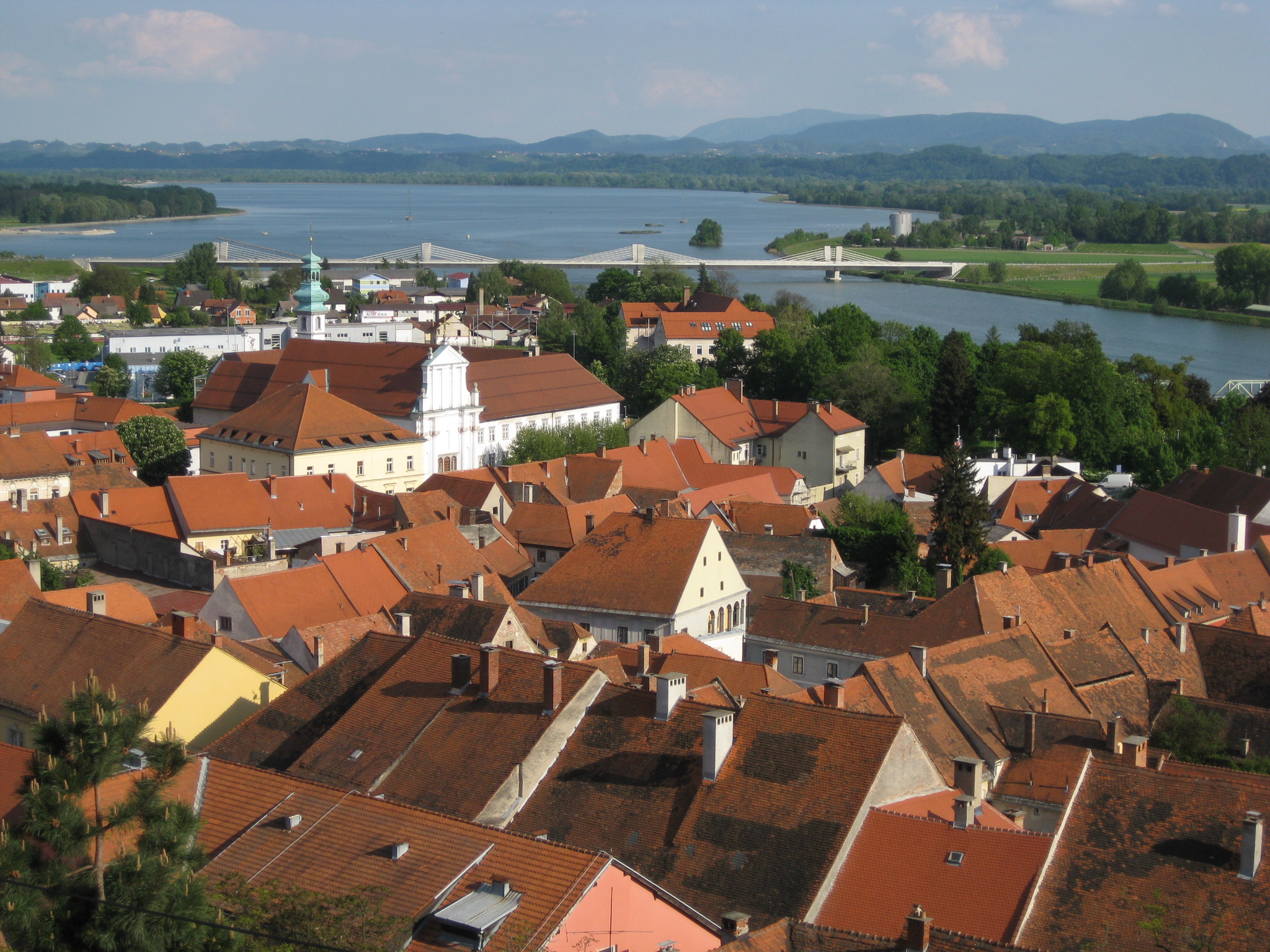 Ptujsko jezero (Ptuj lake), Slovenia